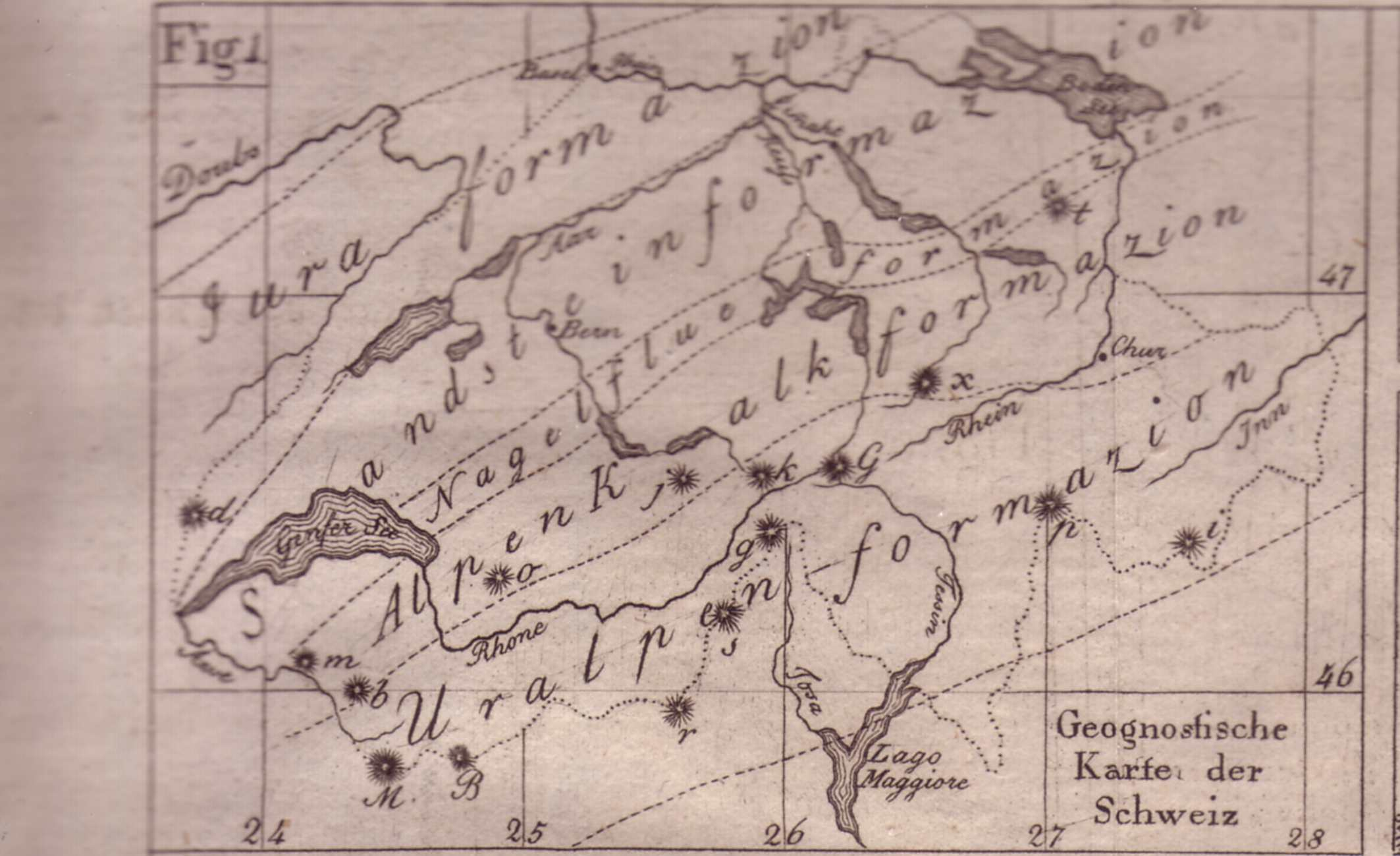 Geognostische Einteilung der Schweiz